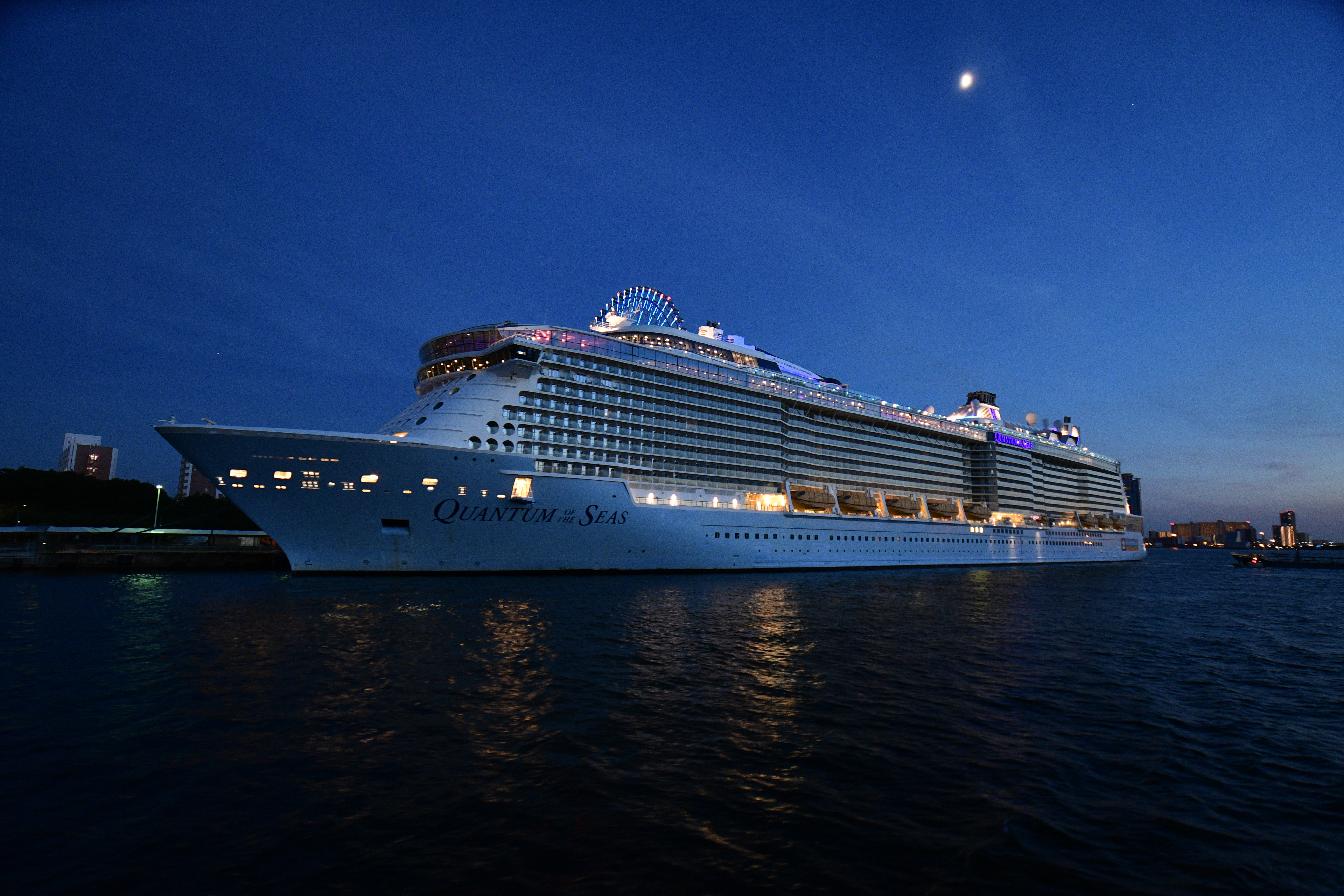 大阪天保山に停泊中のクァンタム・オブ・ザ・シーズ Nikon D7500